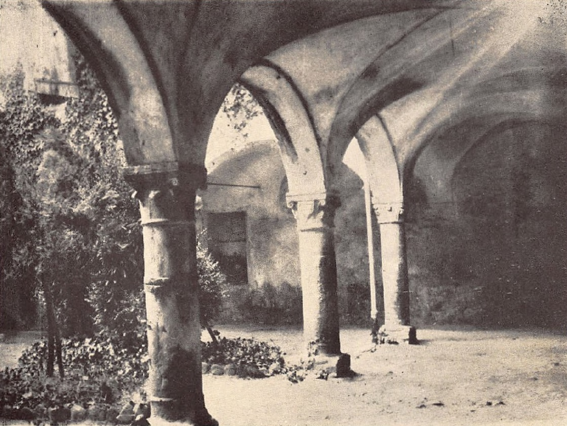 Chiostro del Castello Centurione (ex monastero di Santo Stefano) a Millesimo (Savona)